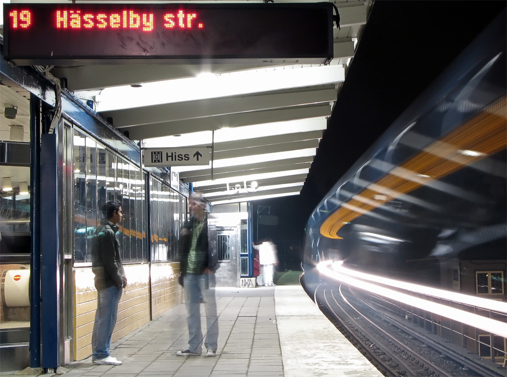 Rågsved subway station in Stockholm, Sweden